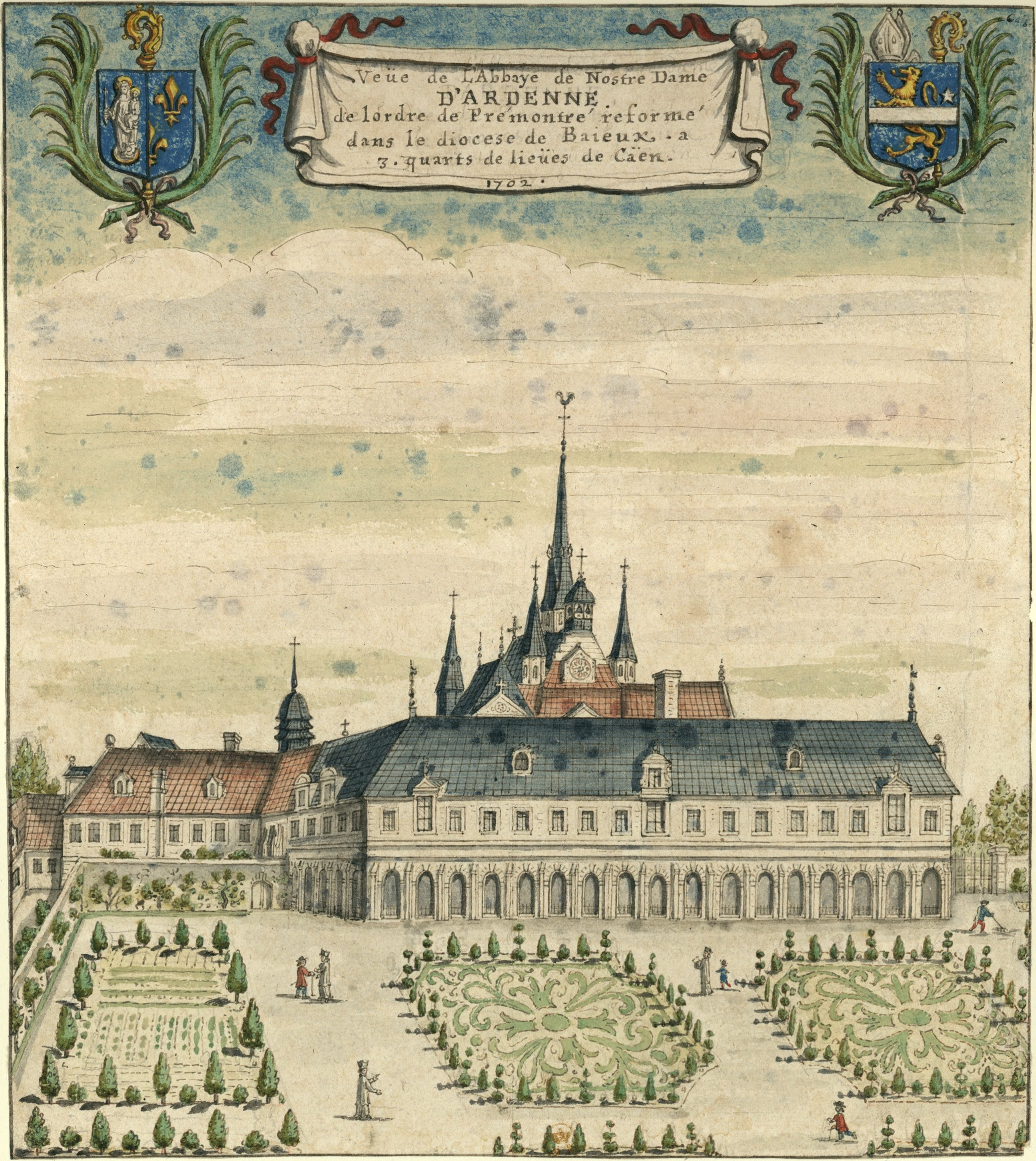 «Veüe de l'Abbaye de Nostre Dame D'ARDENNE de l'ordre de Prémontré reformé dans le diocèse de Baieux. a 3. quarts de lieüs de Caen»